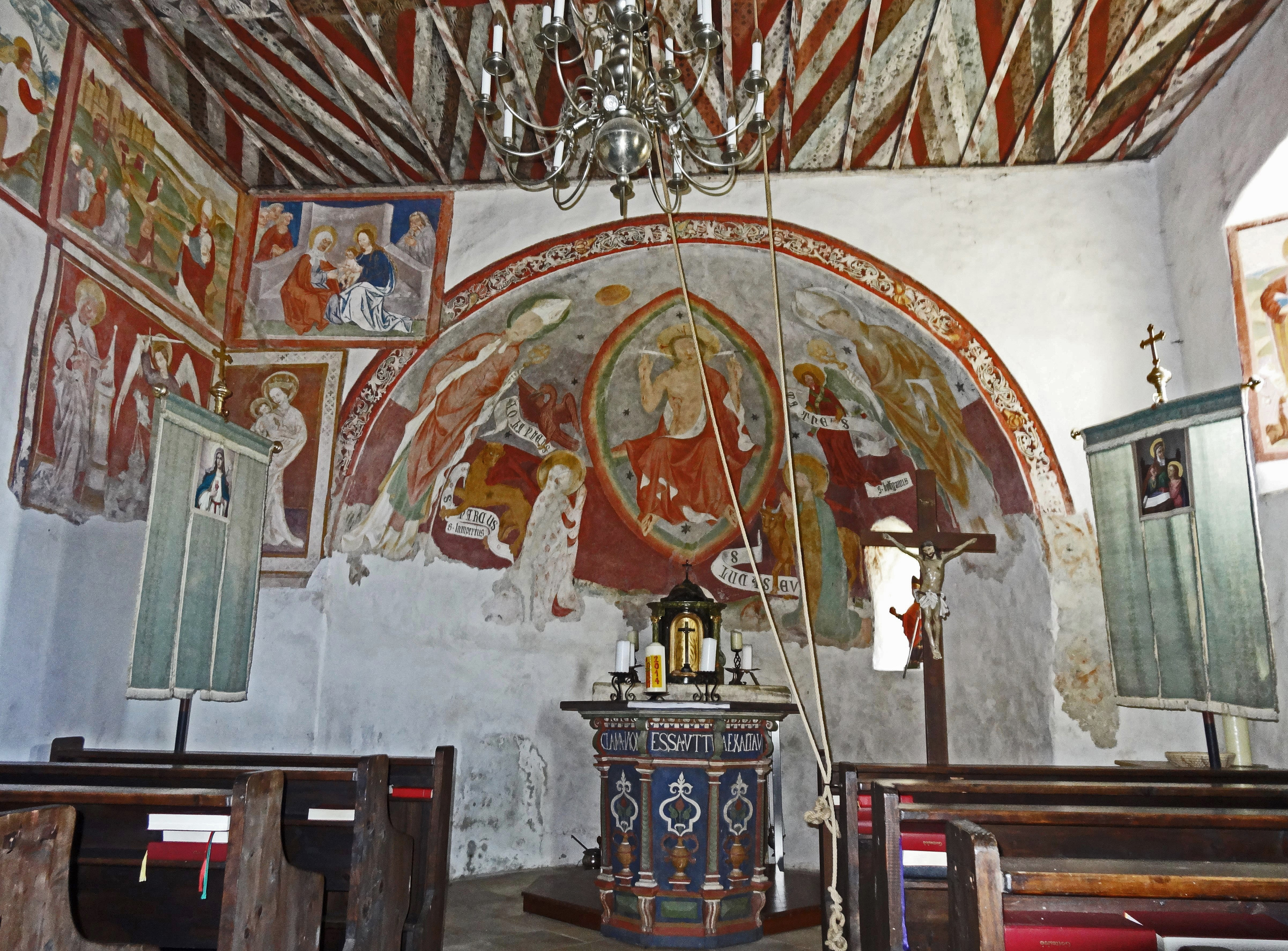 Kath. Filialkirche hl. Lambert, Hart (Feldkirchen in Kärnten). Innenansicht